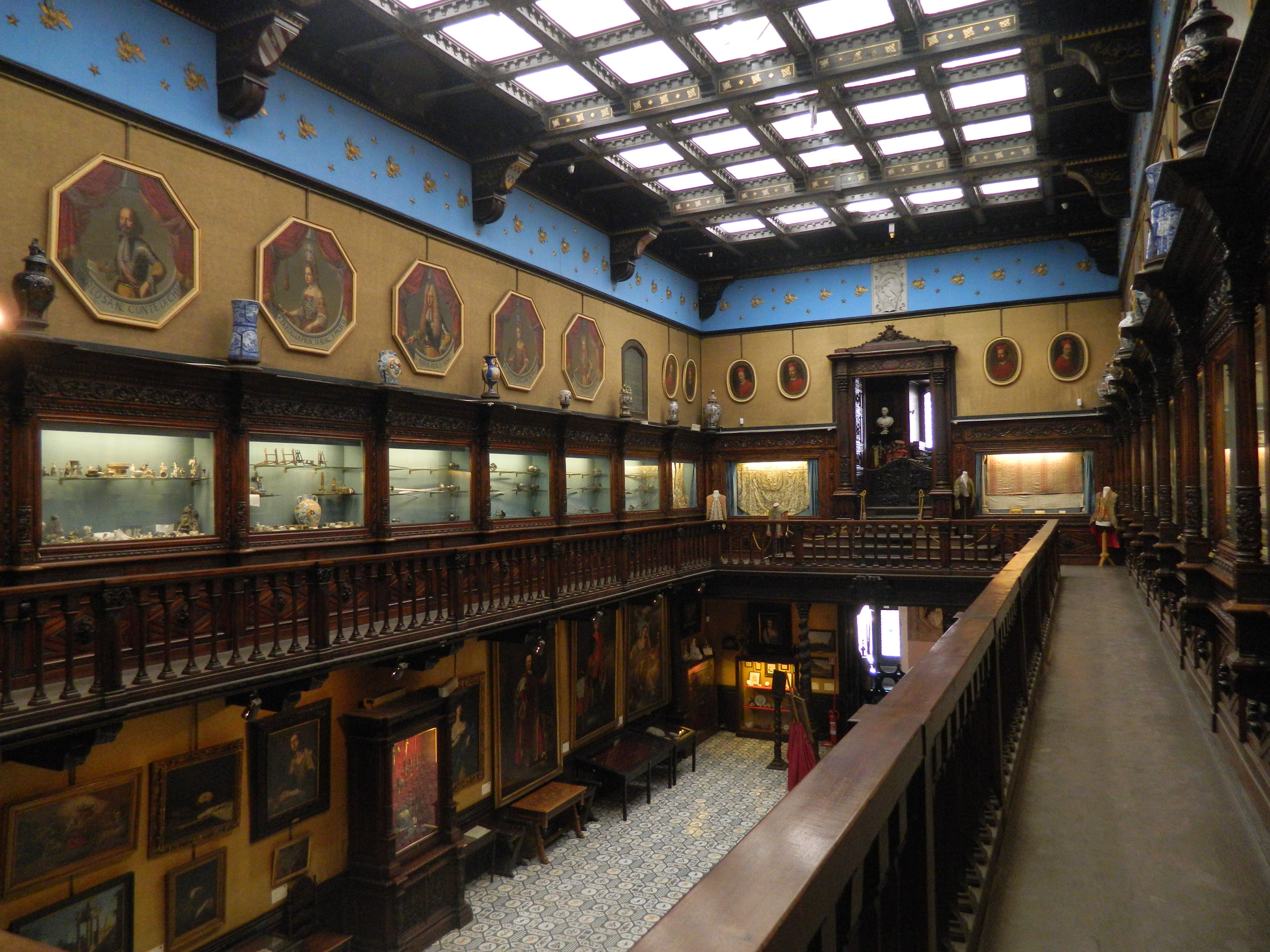 Museo Civico Gaetano Filangieri (Palazzo Como), Napoli.